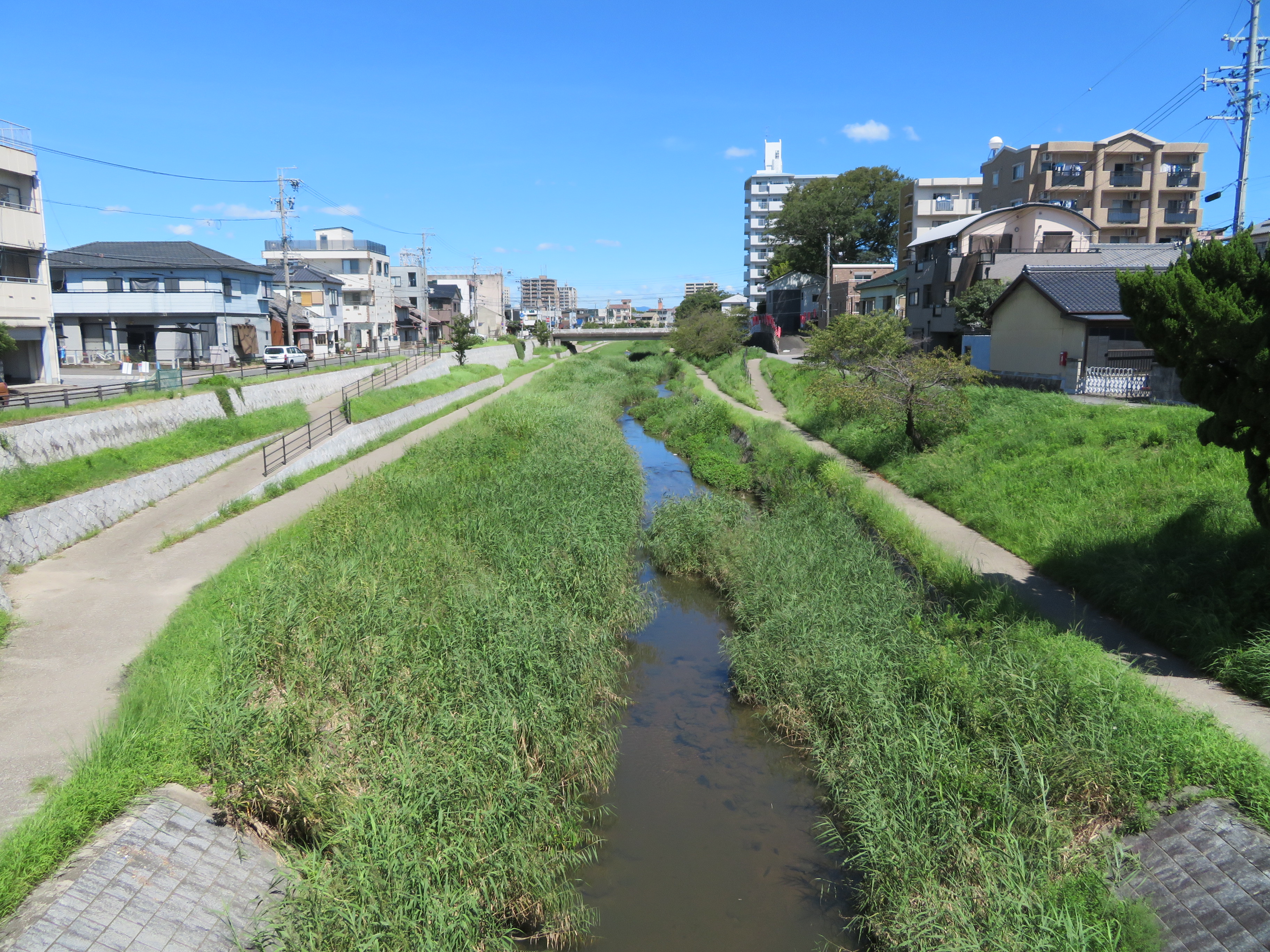 伊賀川。岡崎市西魚町。